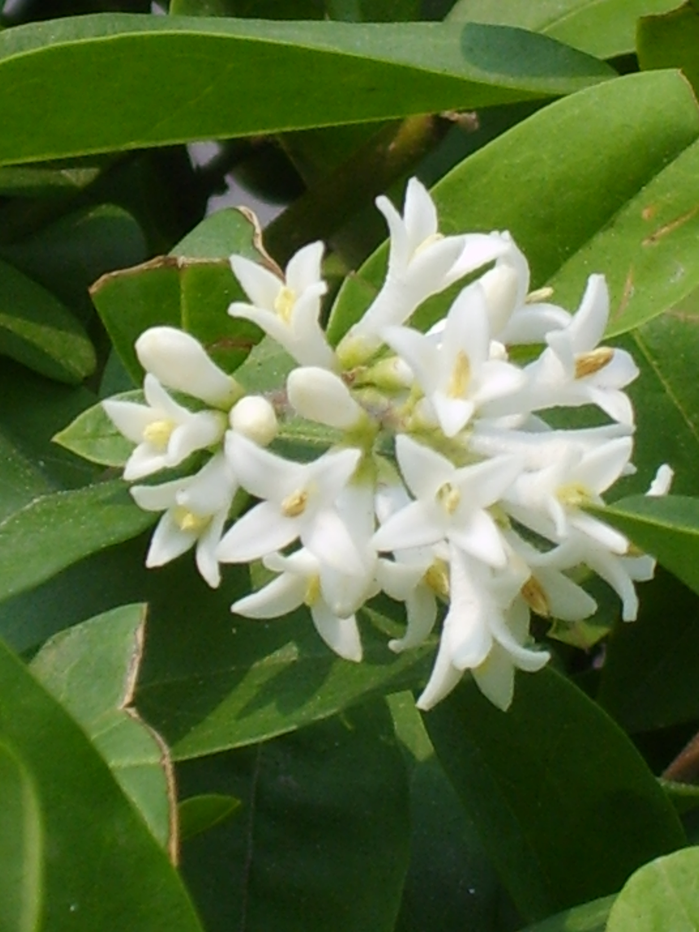 Ligustrum obtusifolium in Bupyung, Korea. 부평남초등학교 근처 주택가에 사는 쥐똥나무 꽃